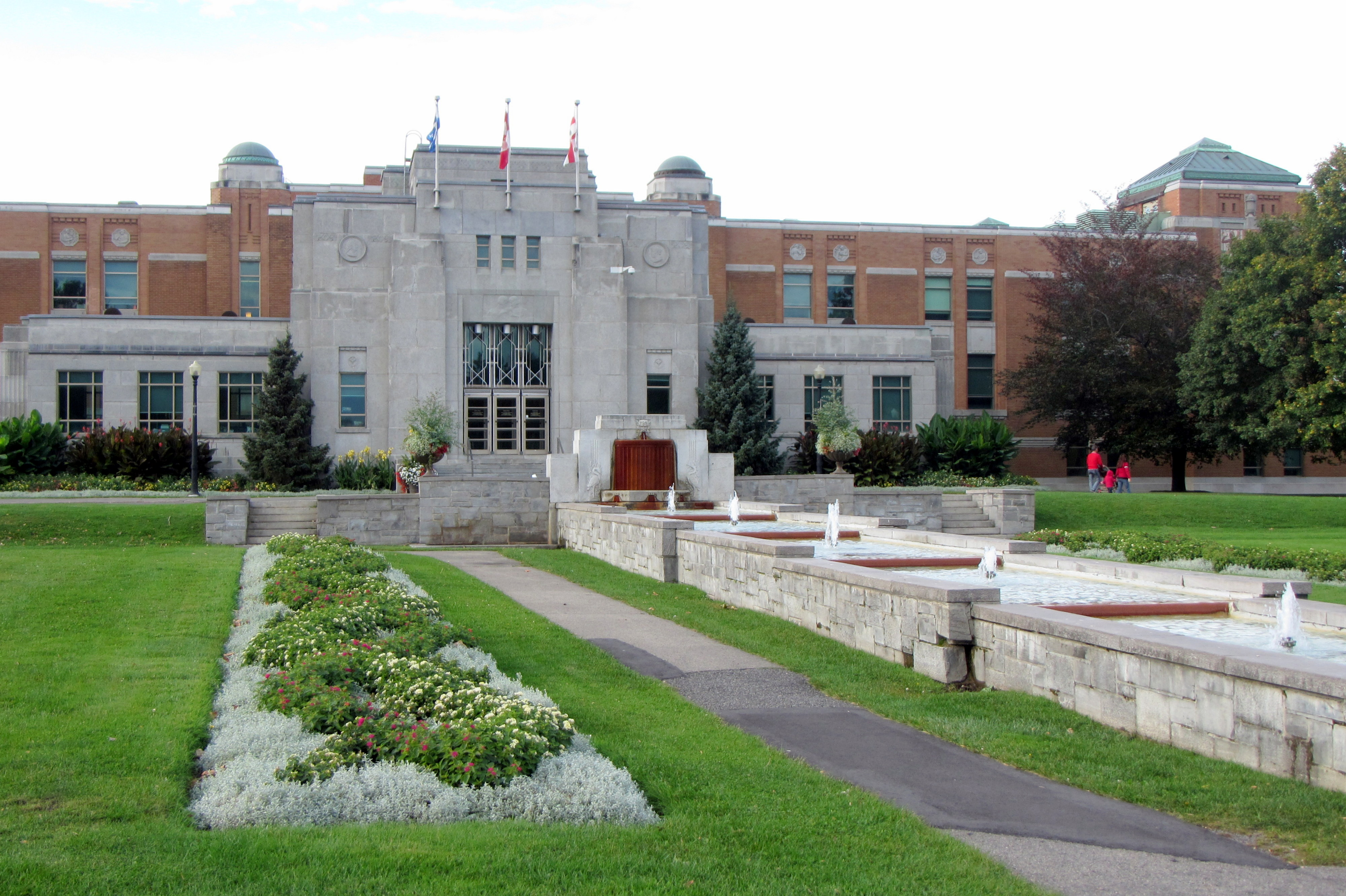 Institut de recherche en biologie végétale de l'Université de Montréal